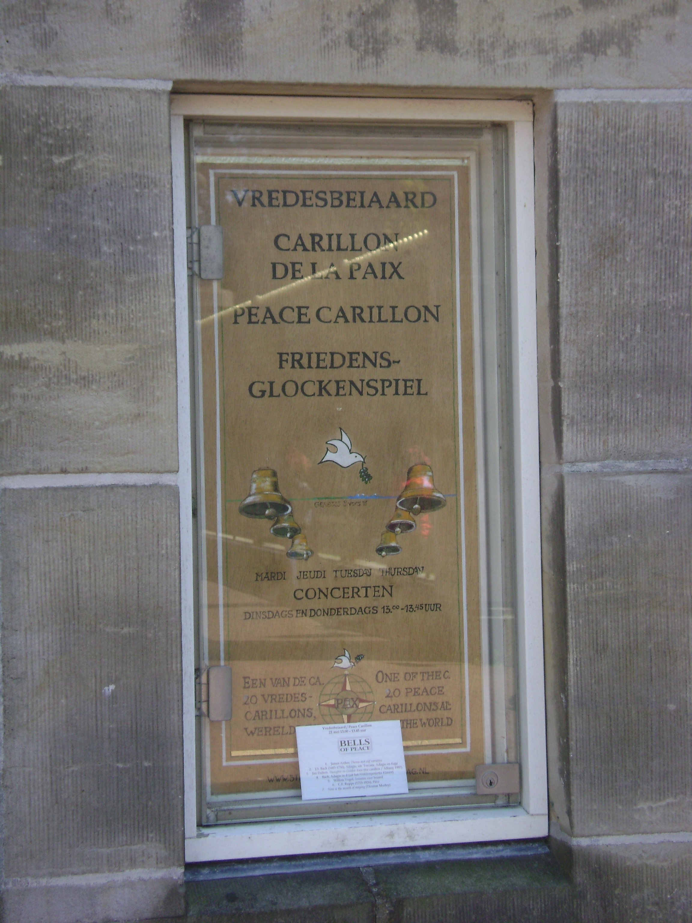 Ανακοίνωση για κονσέρτο Καριγιόν στη Χάγη-Ολλανδία.